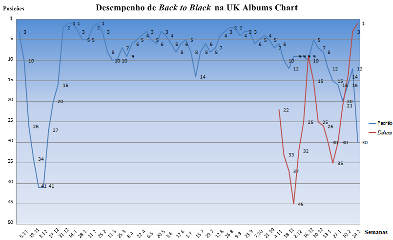 Gráfico a mostrar o desempenho de Back to Black, em suas edições padrão e deluxe, na tabela musical UK Albums Chart entre 5 de novembro de 2006 e 2 de março de 2008 (Fonte das informações: Official Charts Company).